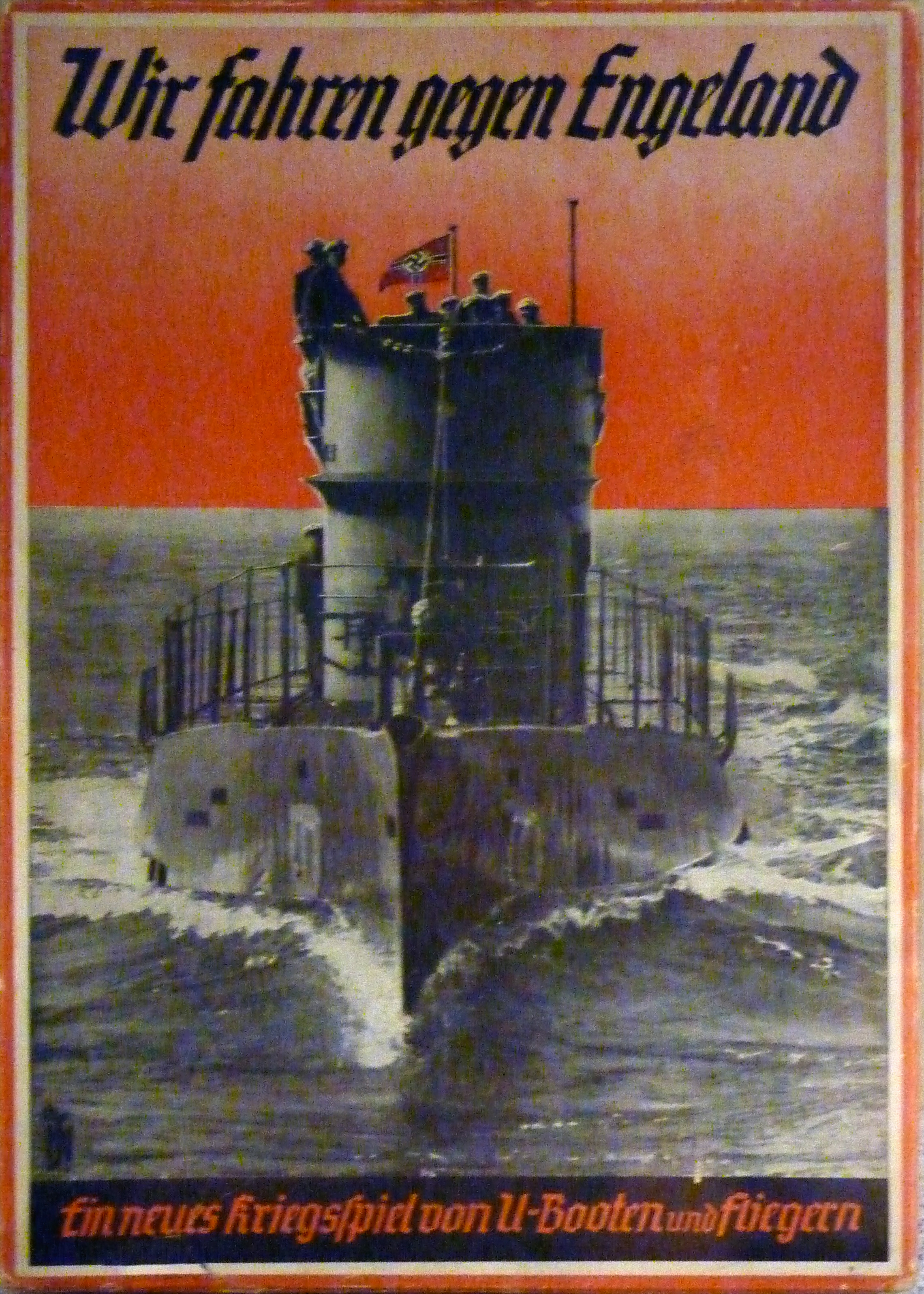 Wir fahren gegen Engeland - Ein neues Kriegsspiel von U-Booten und Fliegern